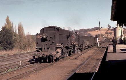 Garratt locomotive 6003 at Molong